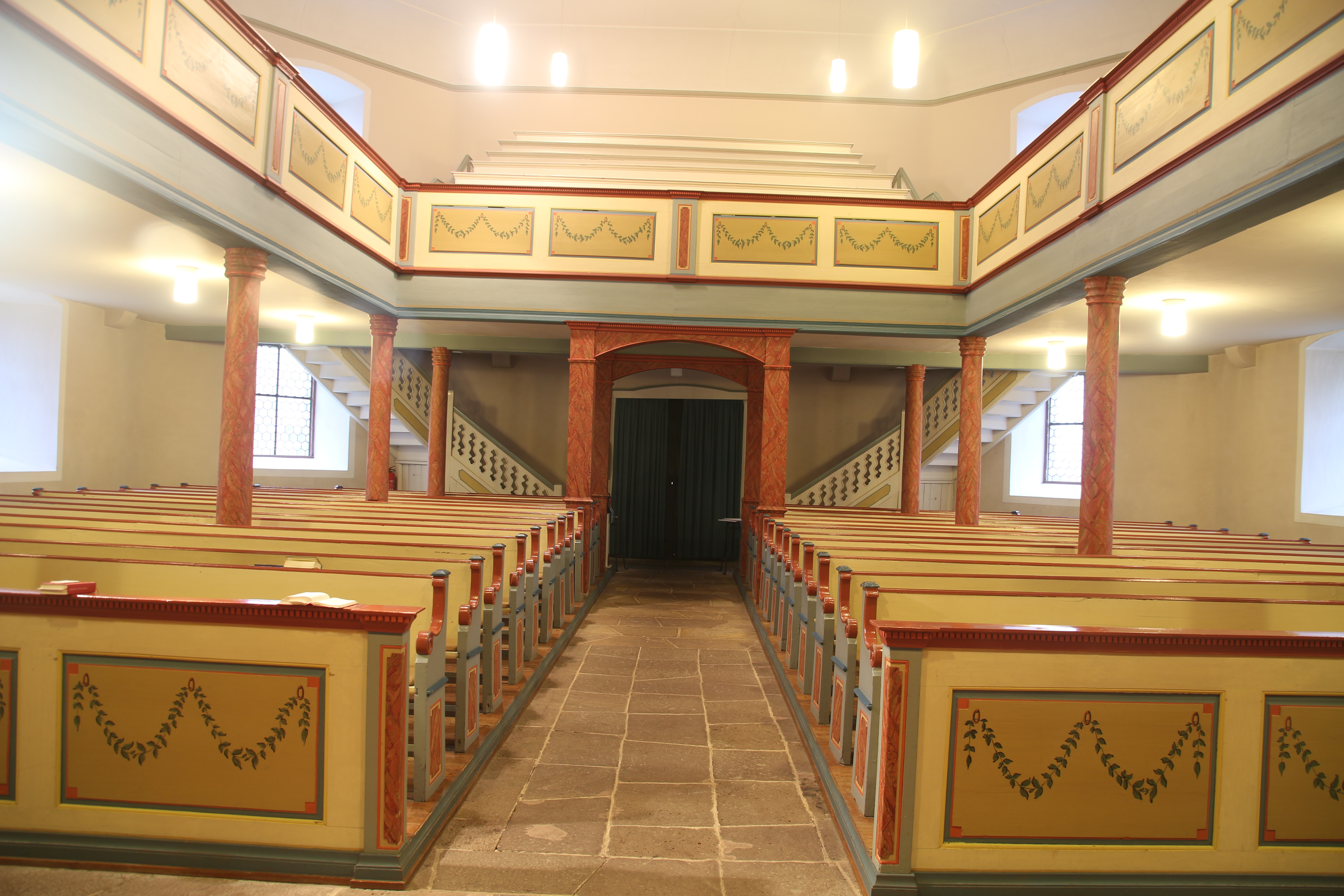 Evangelische Kirche Ober-Ohmen, Vogelsbergkreis, Hessen